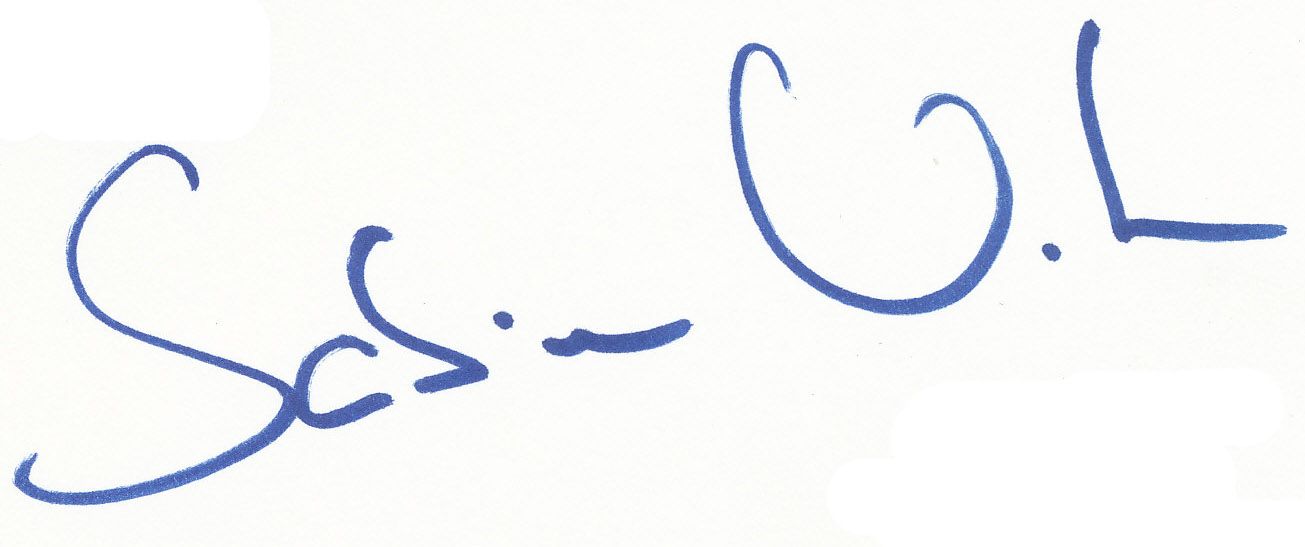 Signatur von Sabine Vitua